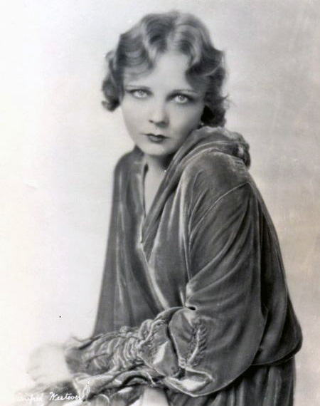 Winifred Westover actrice du muet